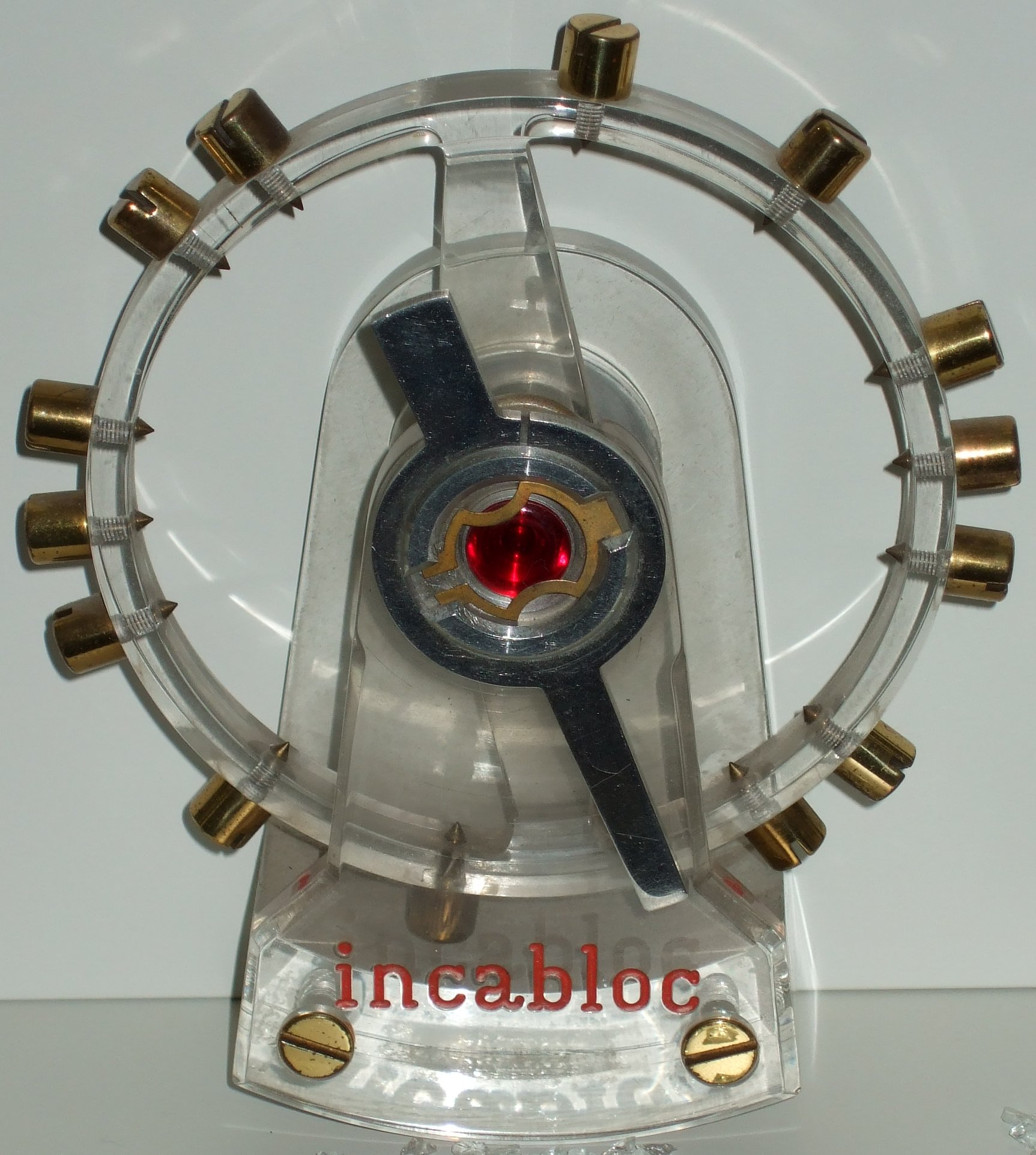 Stoßsicherung Incabloc. (Ausstellungsstück der Uhrensammlung Karl Gebhardt in Nürnberg )